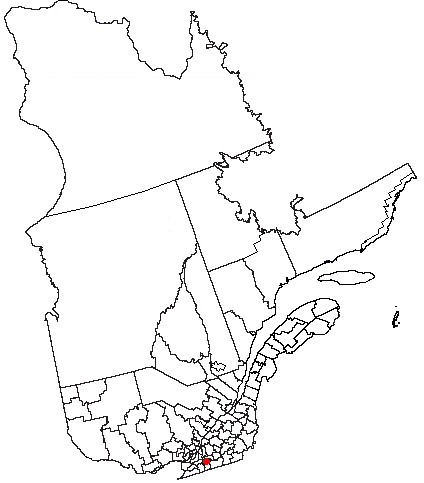 Volapük: Topam in provin: Québec.